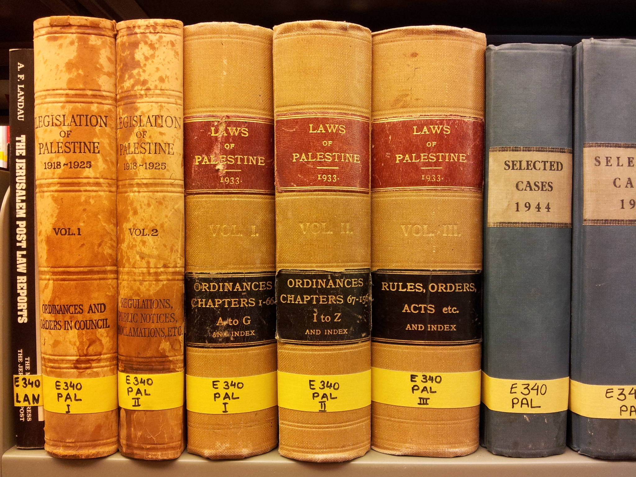 מראה בספריה ביד יצחק בן צבי בירושלים